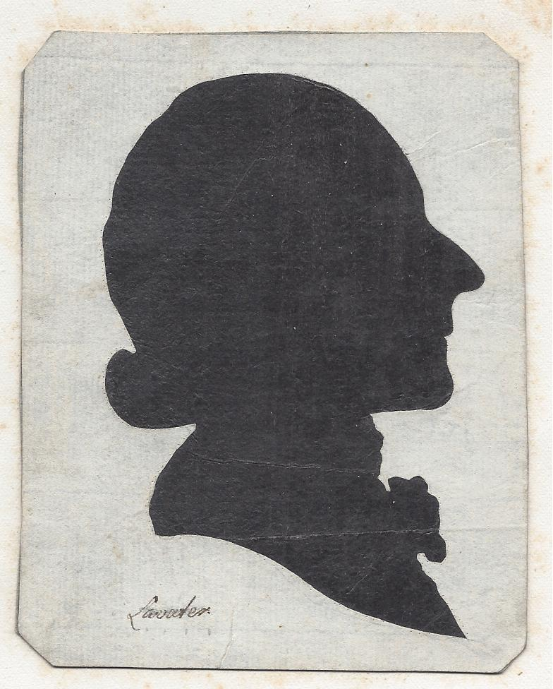 Getuschte Silhouette Johann Kaspar Lavaters auf Karton mit eigenhändiger Signatur Lavaters um 1780